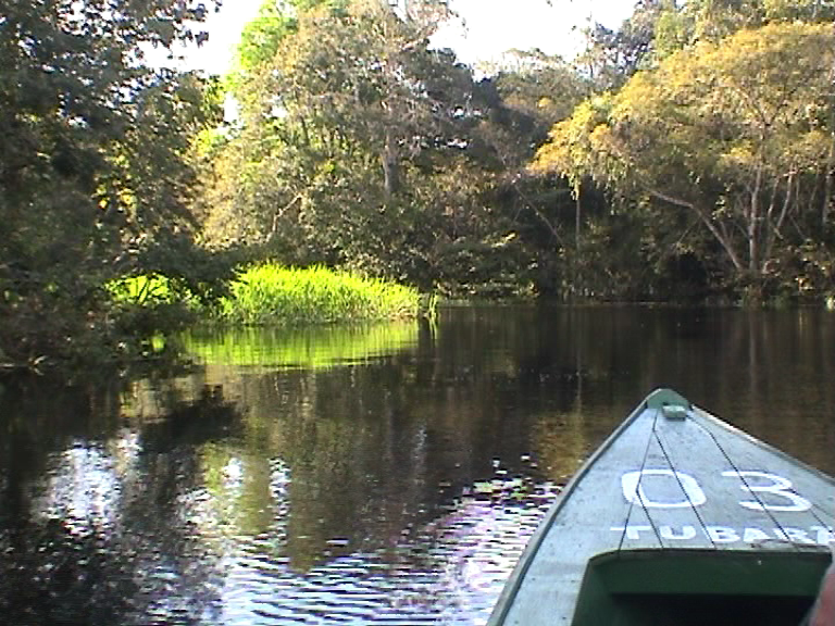 Rio Negro